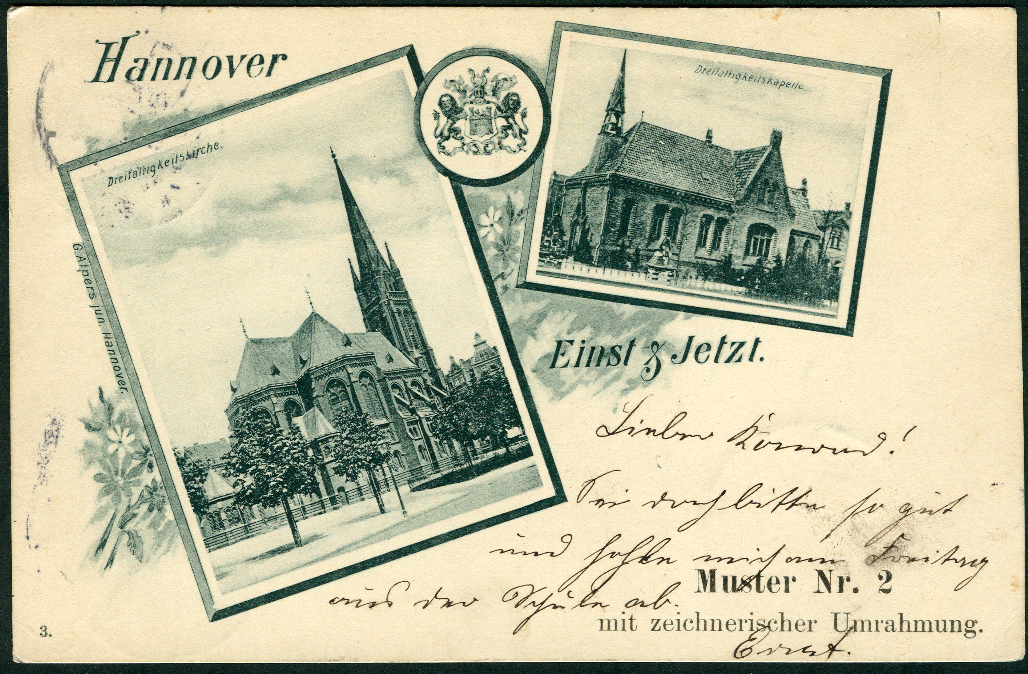 Um 1900 produzierte Ansichtskarte aus älteren Fotografien, reproduziert in der Serie Hannover. Einst & Jetzt des Fotografen und Verlegers Georg Alpers junior, hier das mit der Nummer 3 fortlaufend nummerierte „Muster Nr. 2 / mit zeichnerischer Umrahmung“ der jeweiligen Ansichten der Dreifaltigkeitskirche und der (abgebrochenen) Dreifaltigkeitskapelle und von Ernst an Konrad in Berlin beschriftet ...